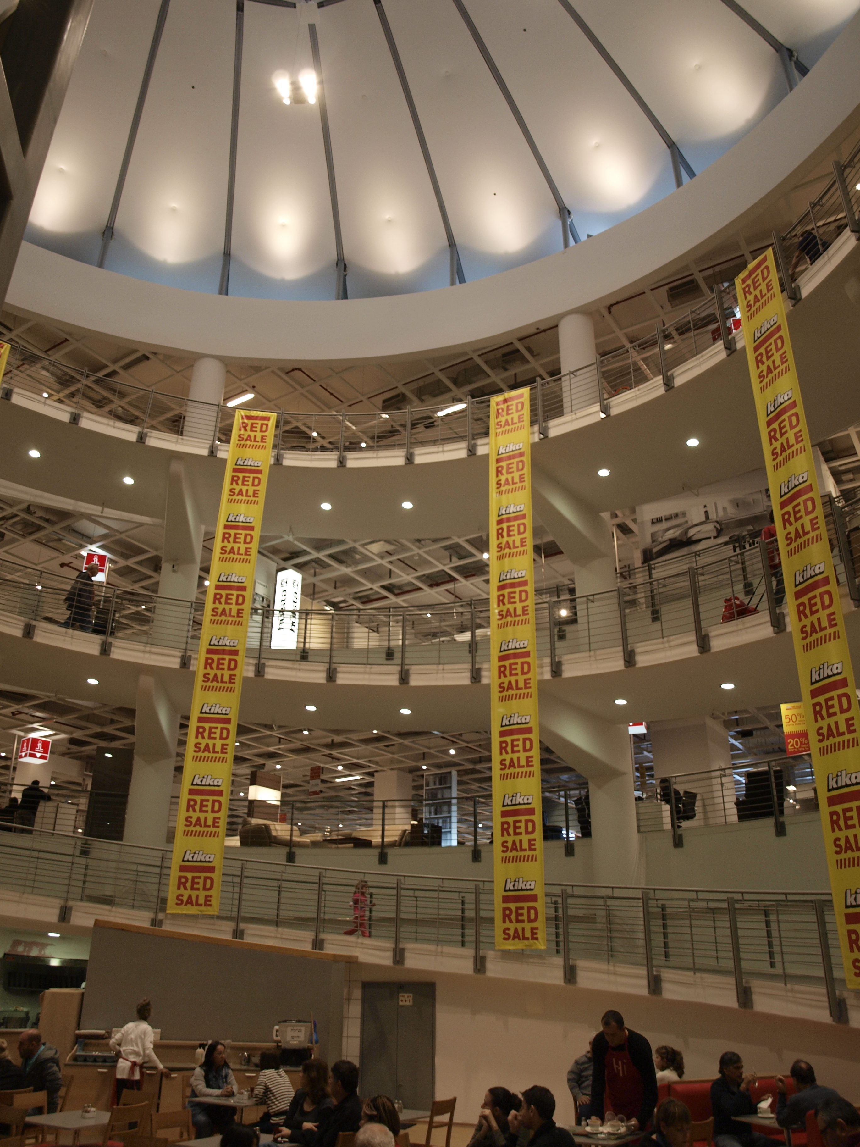 Kika store, Netanya, Israel